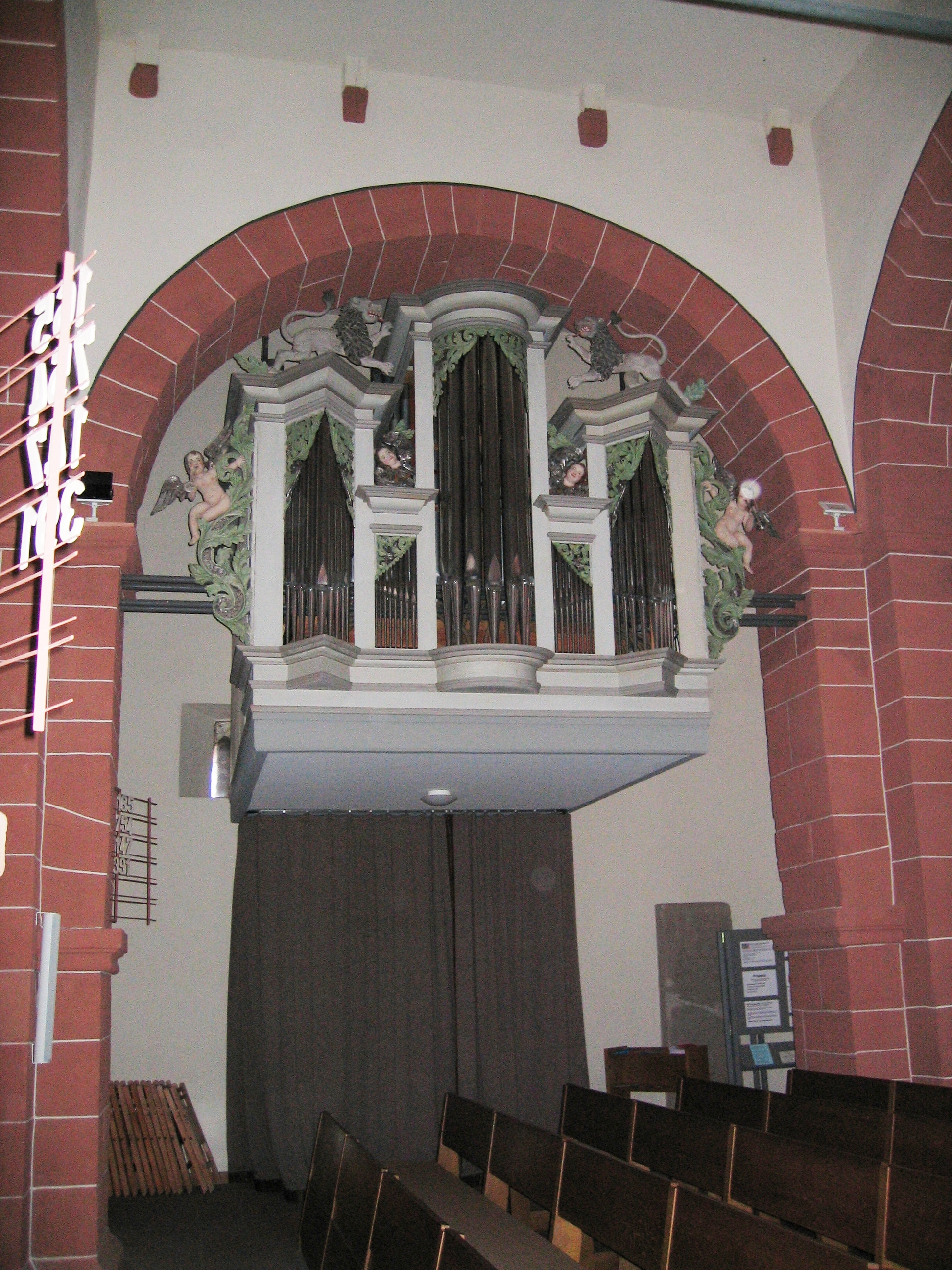 Orgel der Evangelischen Stadtkirche in Schlitz (Vogelsbergkreis).